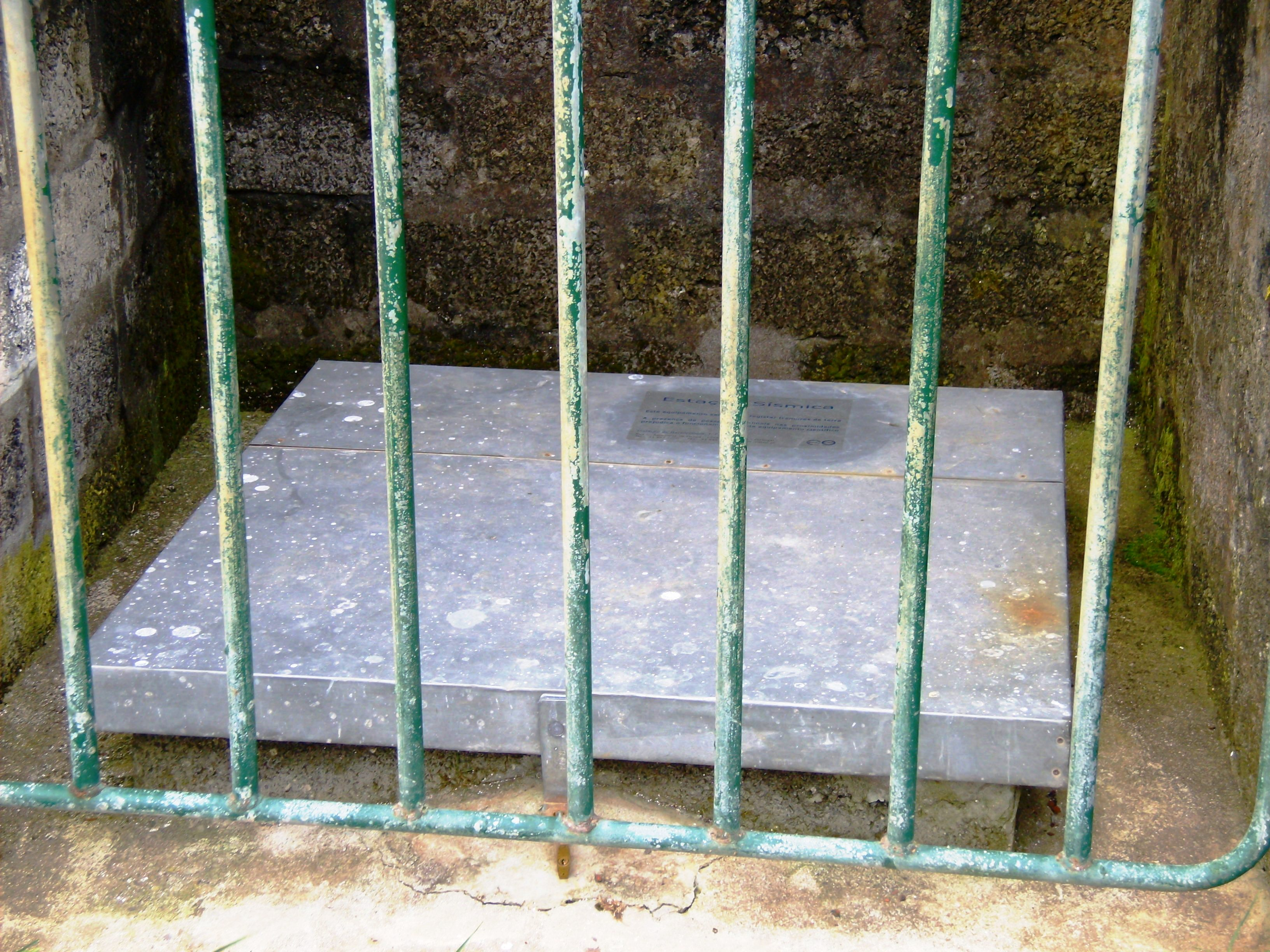 Estação sísmica junto à Ermida de Nossa Senhora de Lurdes, Ilha de Santa Maria (Açores), Portugal.